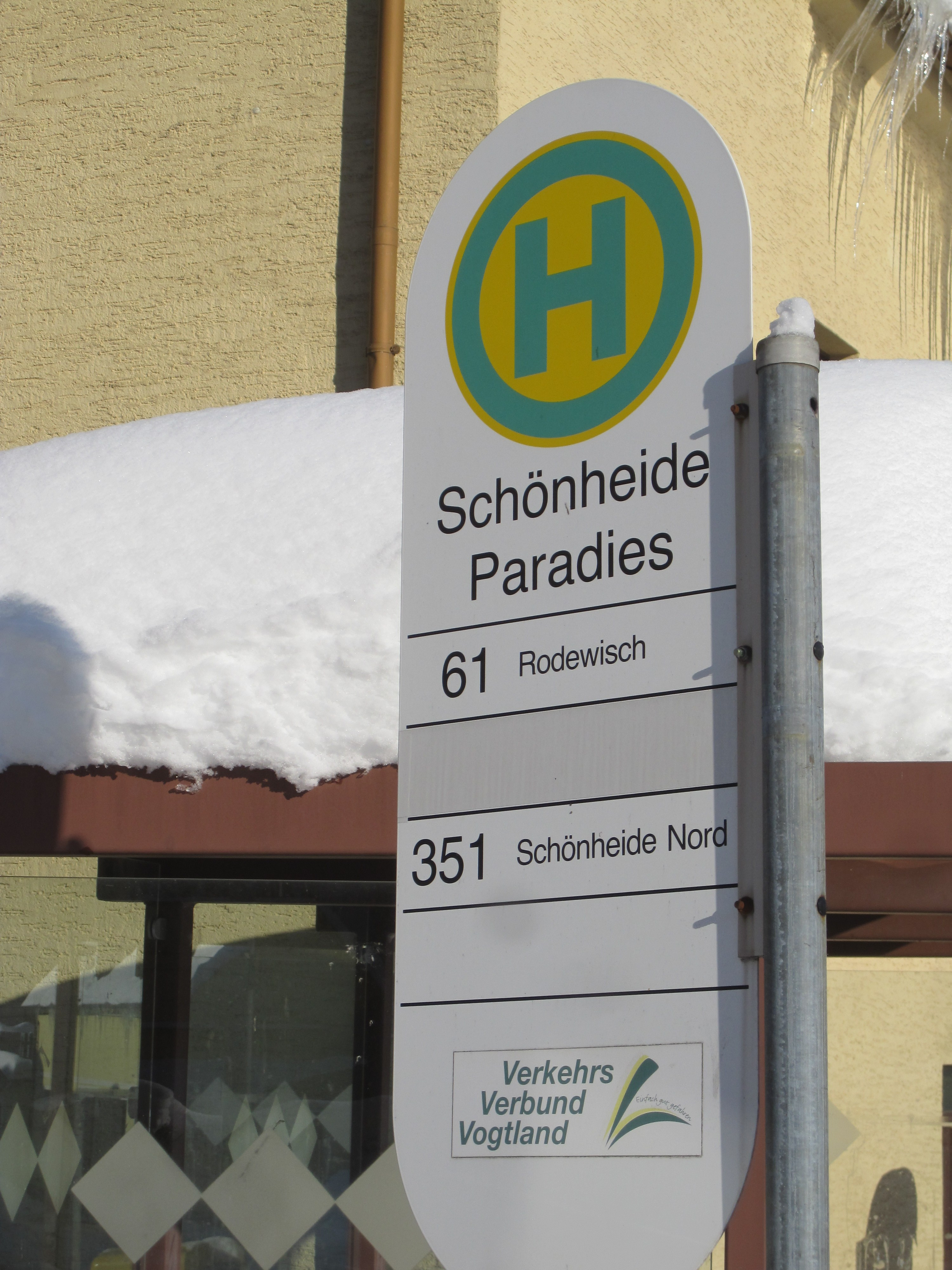 Die Bushaltestelle Paradies ist nach der gleichnamigen Straße benannt.